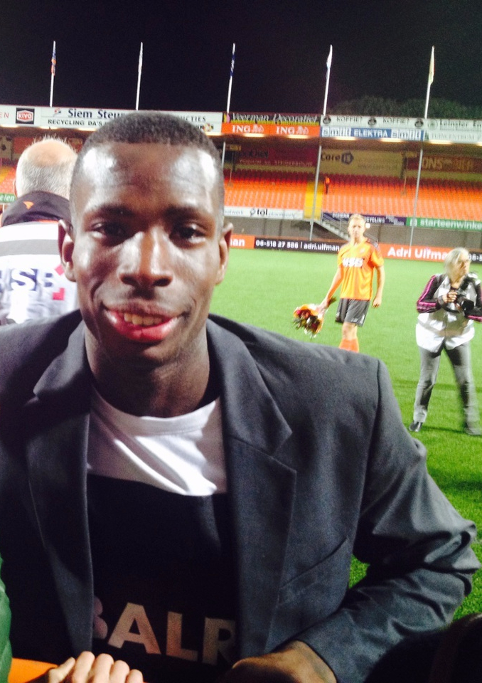 Gyliano van Velzen na FC Volendam - Almere City FC